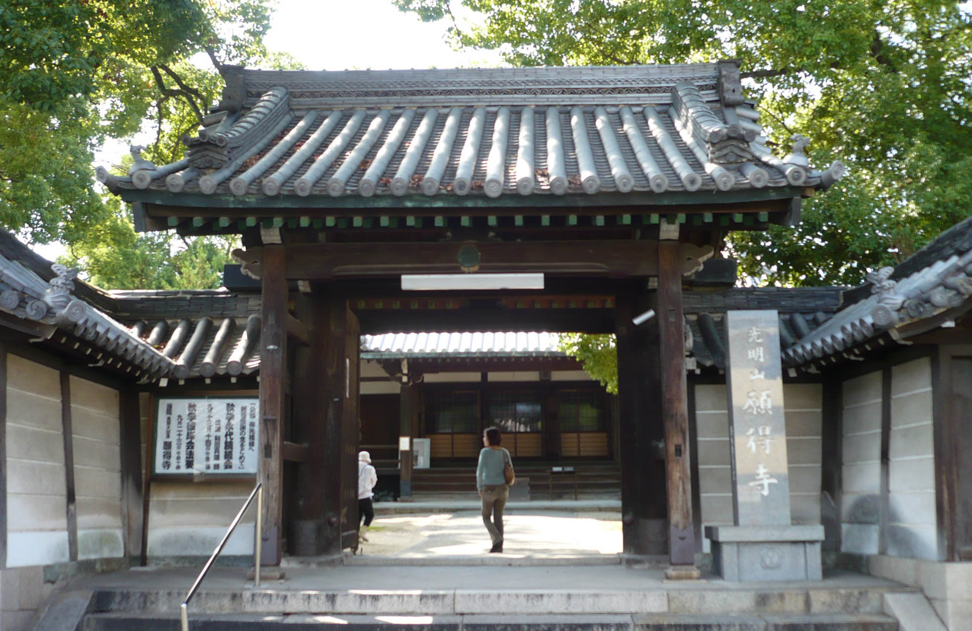 正面四脚門